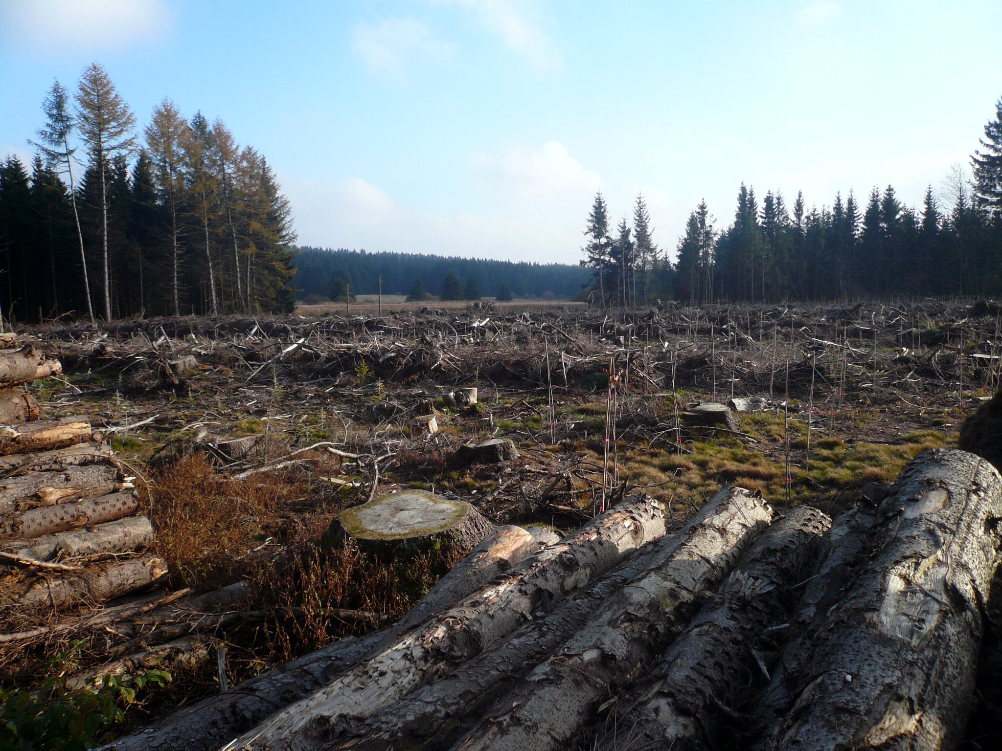 Rotes Moor, Windbruch